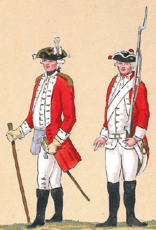 39. Regiment Pieszy Koronny im. Królewicza